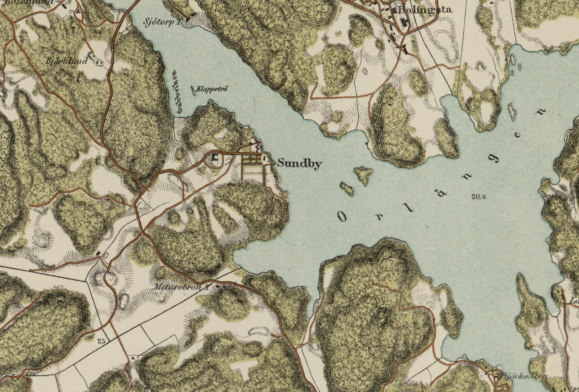 Karta visande del av sjön Orlången samt Sundby gård och Balingsta gård i Huddinge kommun